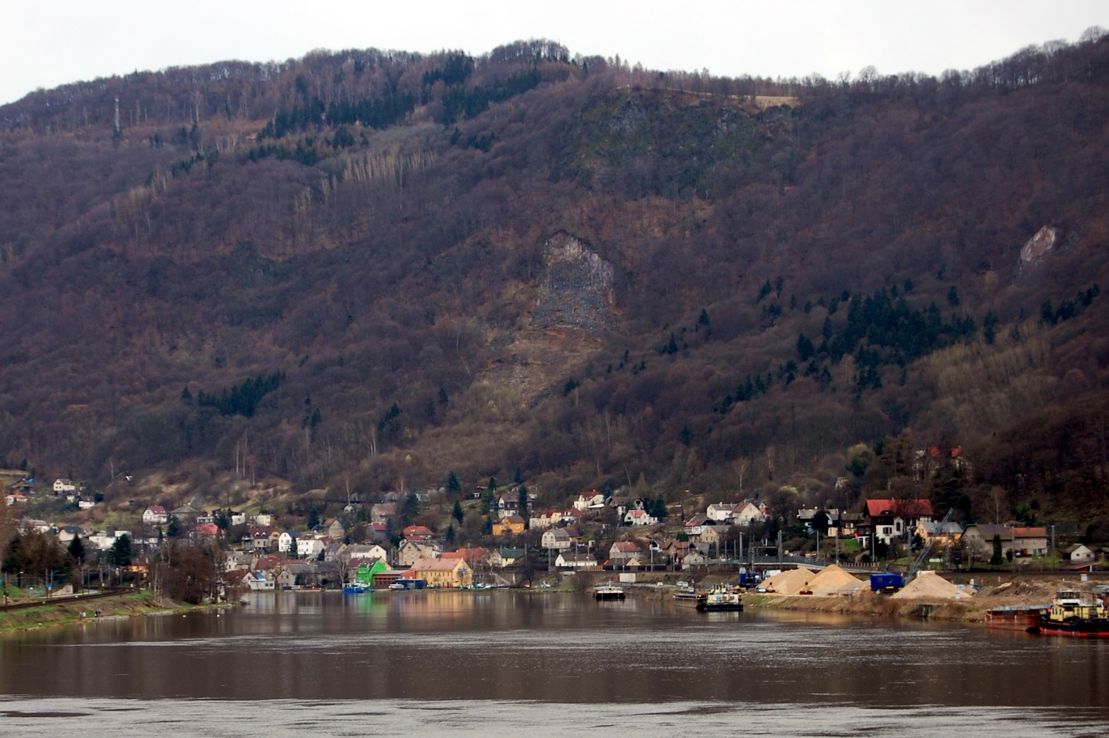 Pohled na Vaňov z Masarykových zdymadel (též zdymadlo Střekov).